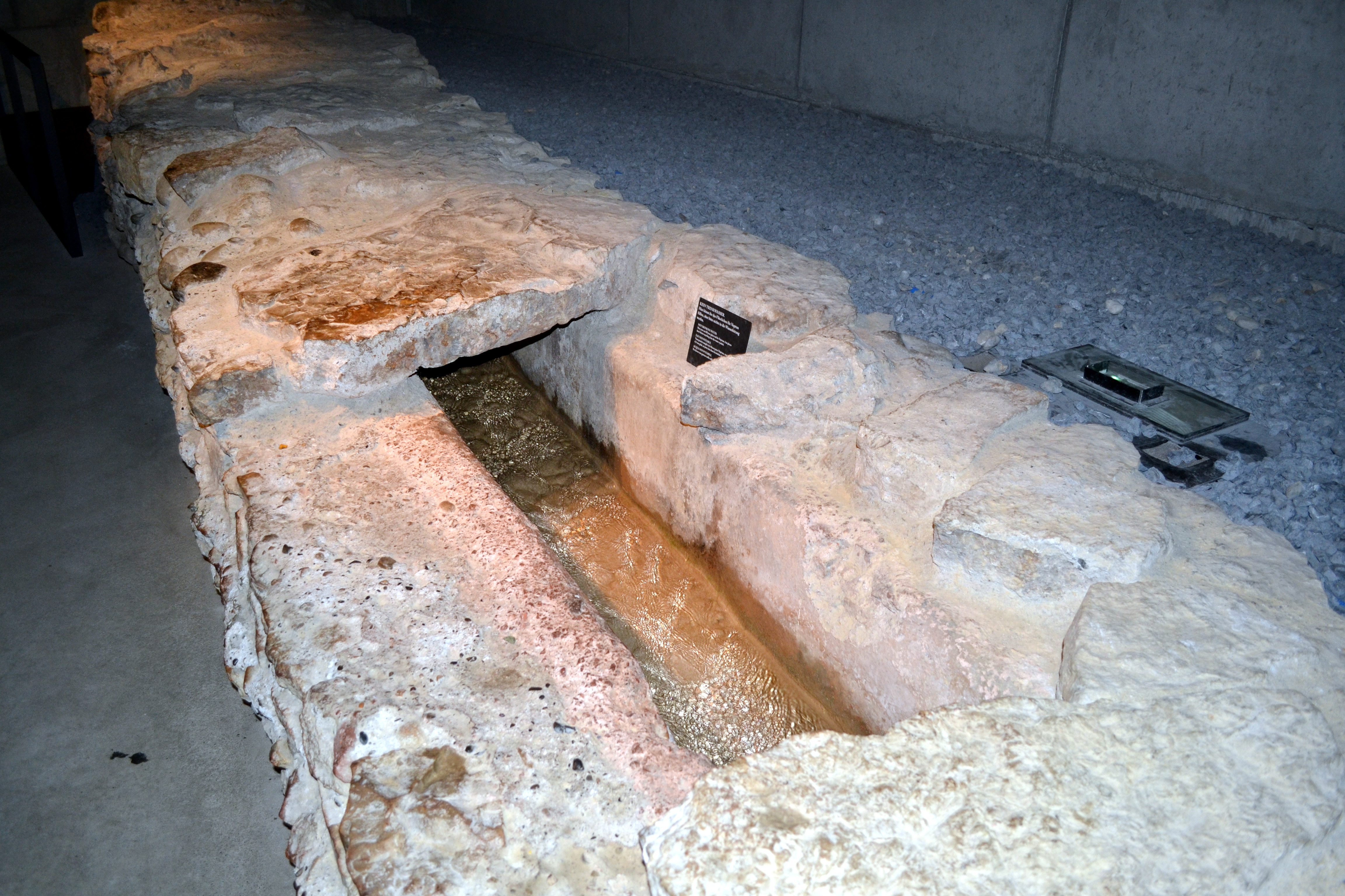 Wasserführende römische/mittelalterliche Wasserleitung von Vindonissa/Windisch Öffentlich sichtbarer Bereich im Altersheim von Windisch Legionärspfad Vindonissa - Station VIII: Aquaeductus